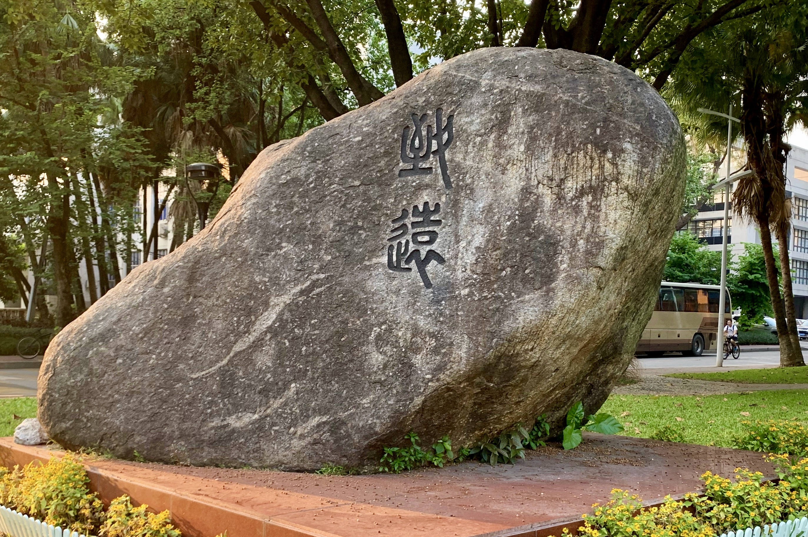 华南理工大学五山校区致远石